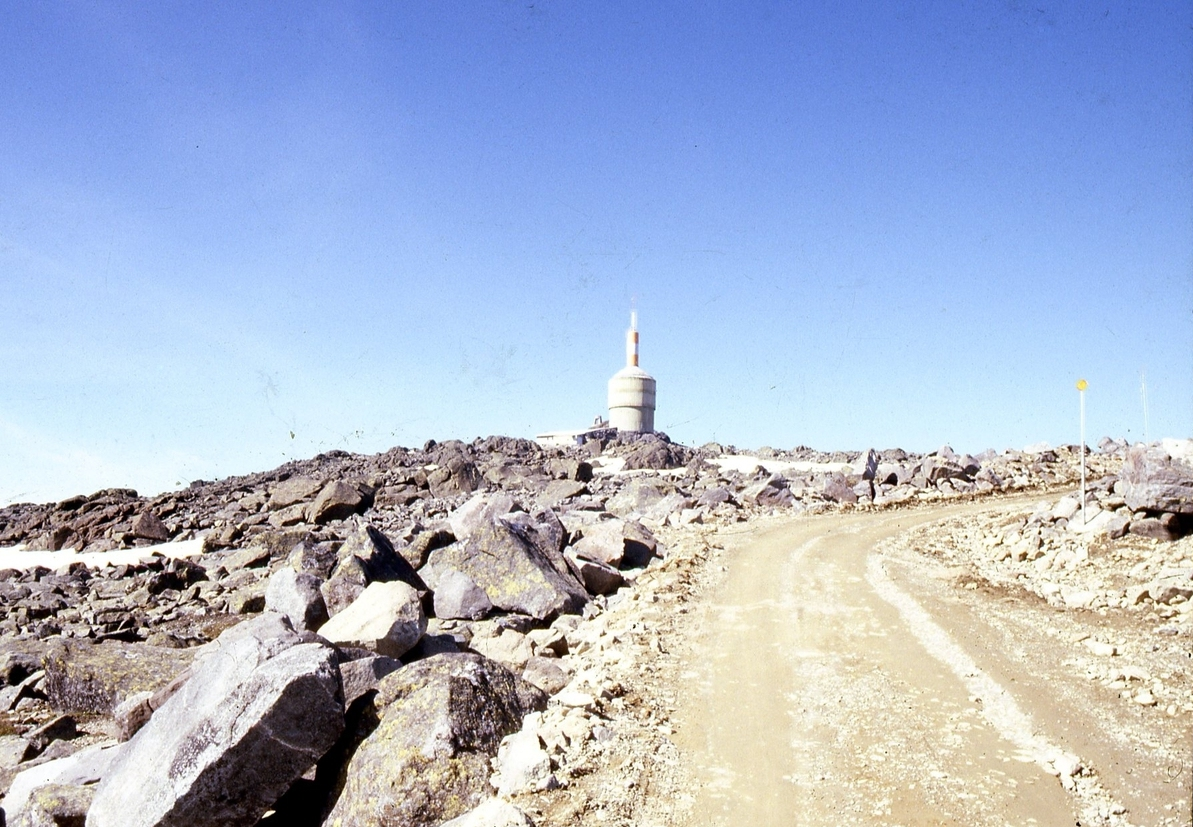 Radiolinjestasjon på toppen av Tron